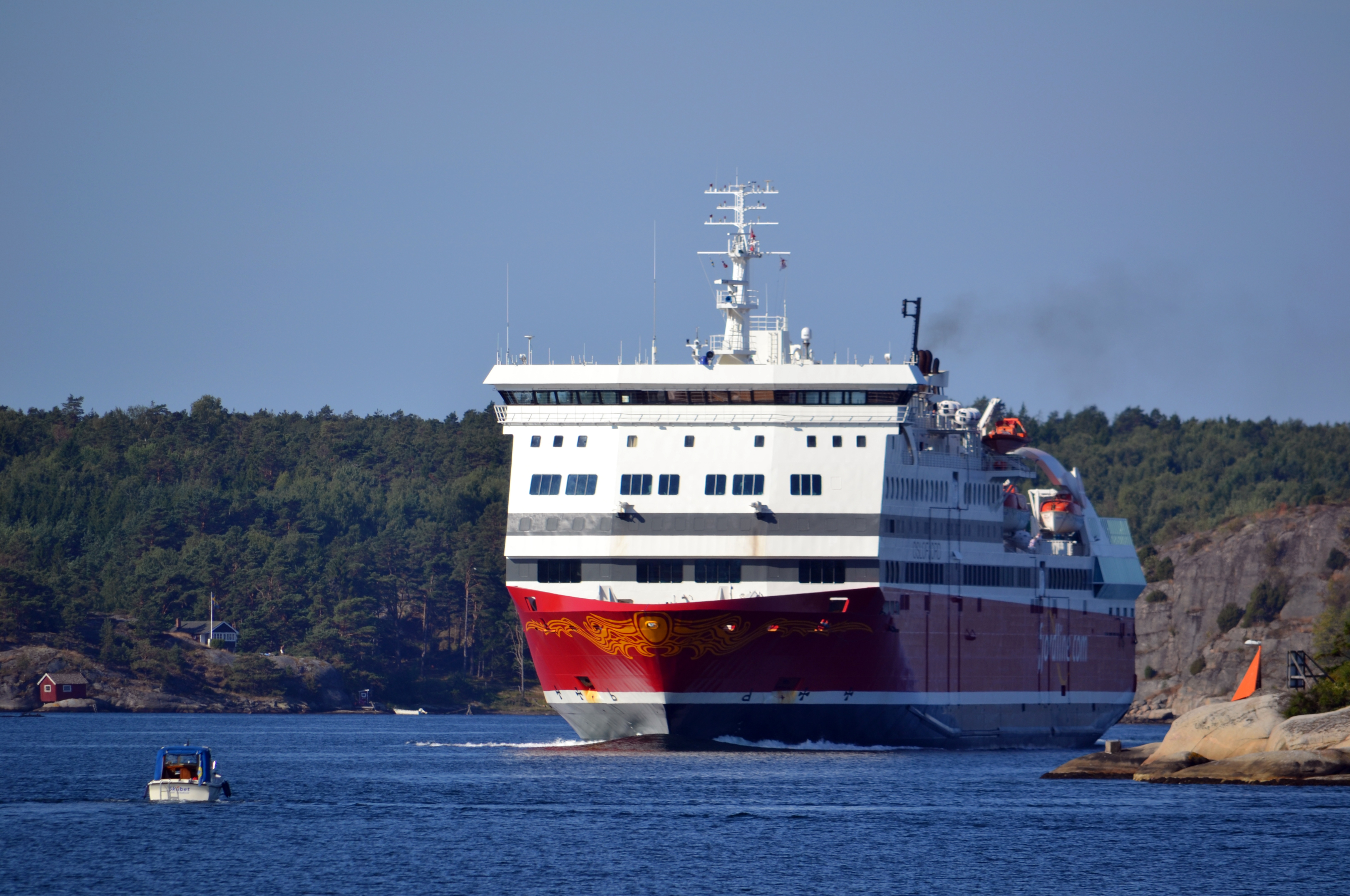 Oslofjord i Strömstad